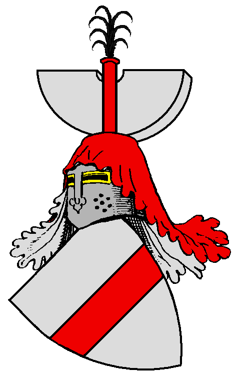 Stammwappen der von Kottwitz, niederschlesischer Uradel mit gleichnamigem Stammhause bei Breslau.